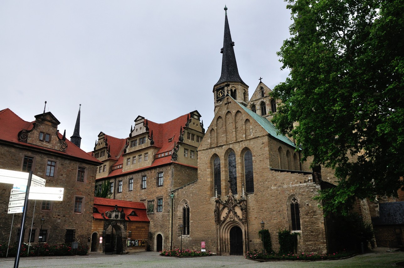 Merseburger Dom und Schloss